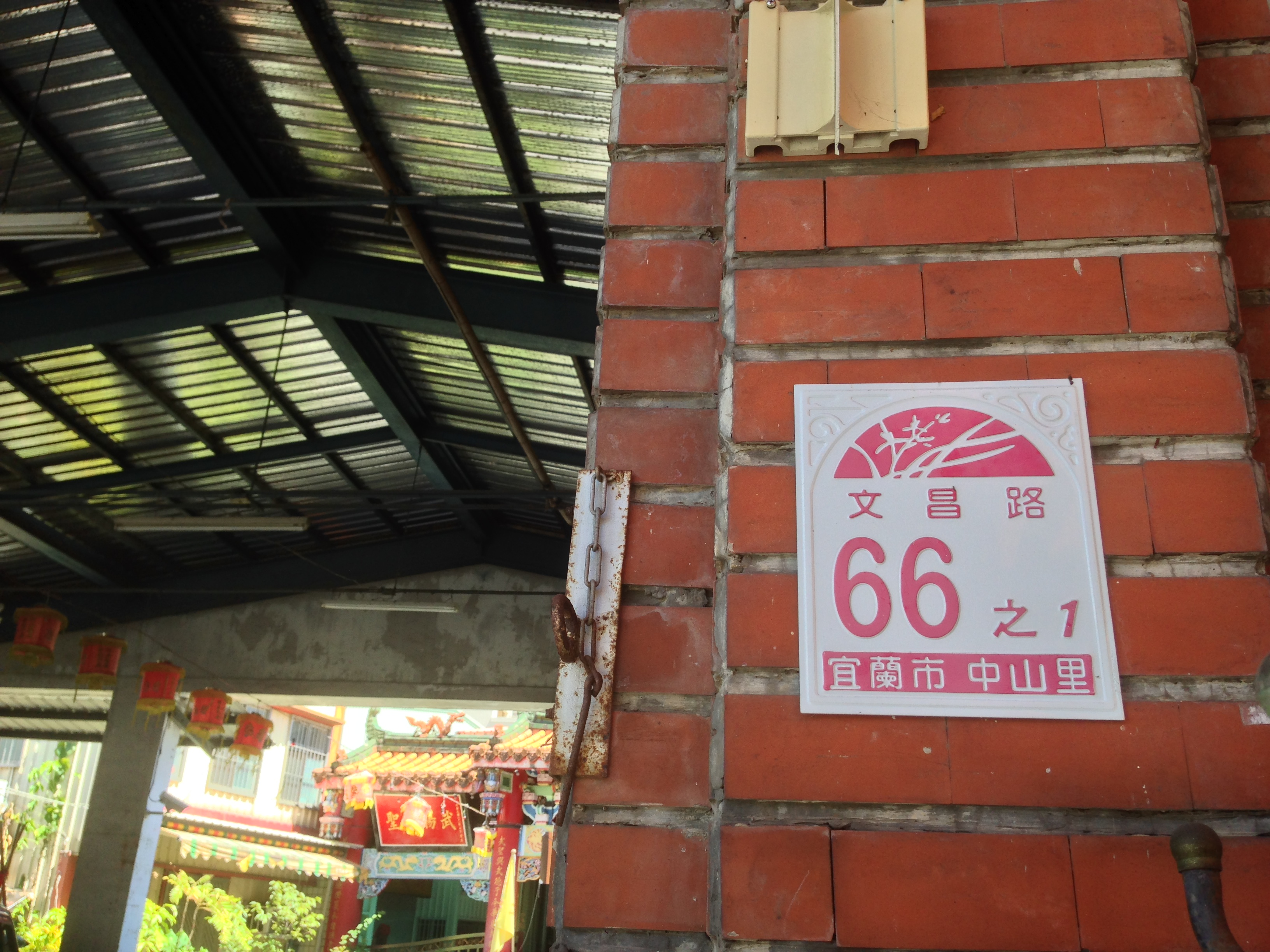 中文（台灣）: 宜蘭文昌廟門牌